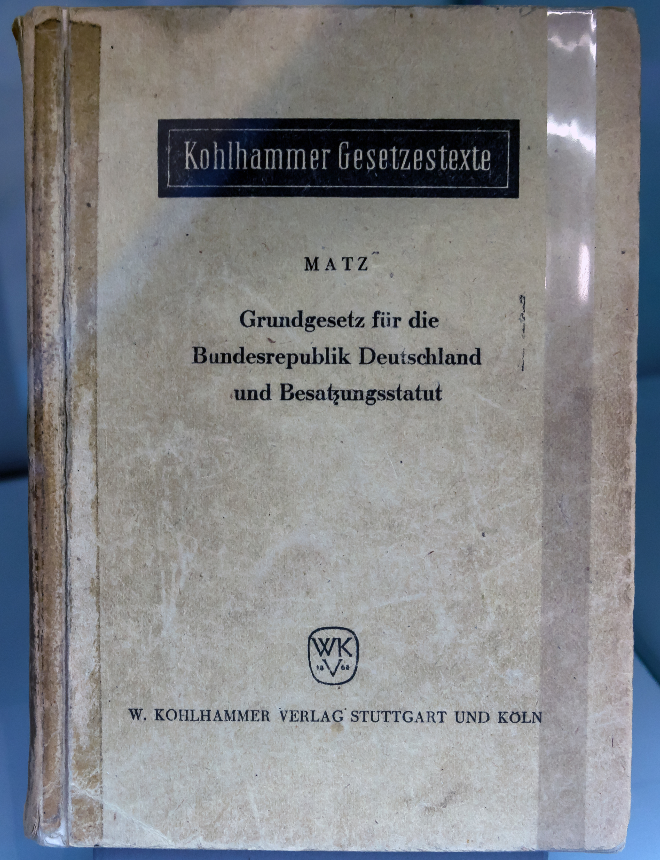 Grundgesetz und Besatzungsstatut von 1949. Durch das Statut sind die Kompetenzen der Bundesregierung und des Bundestags eingeschränkt